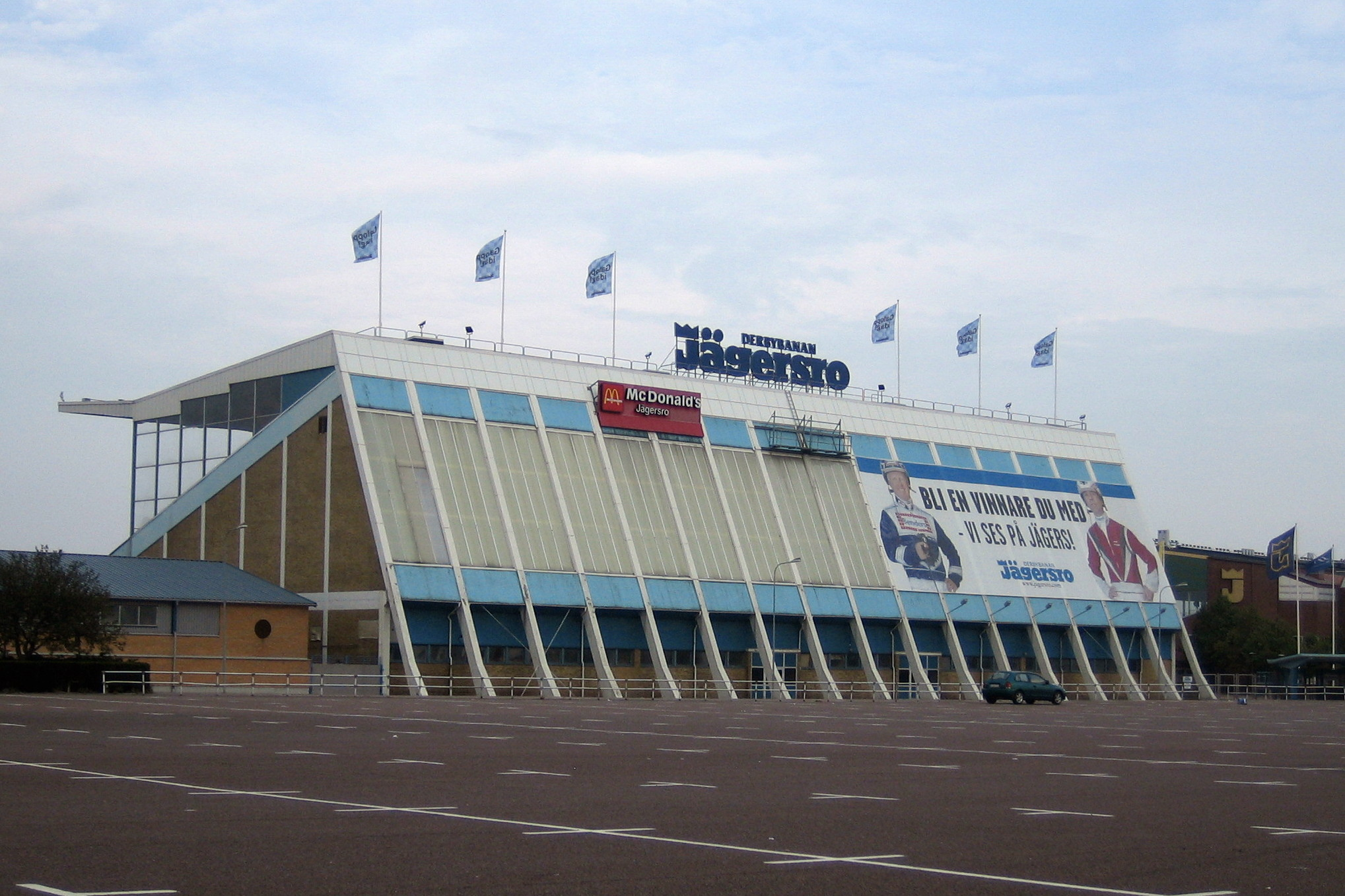 Parking and main stands at Jägersro horseracing, Malmö, Sweden.